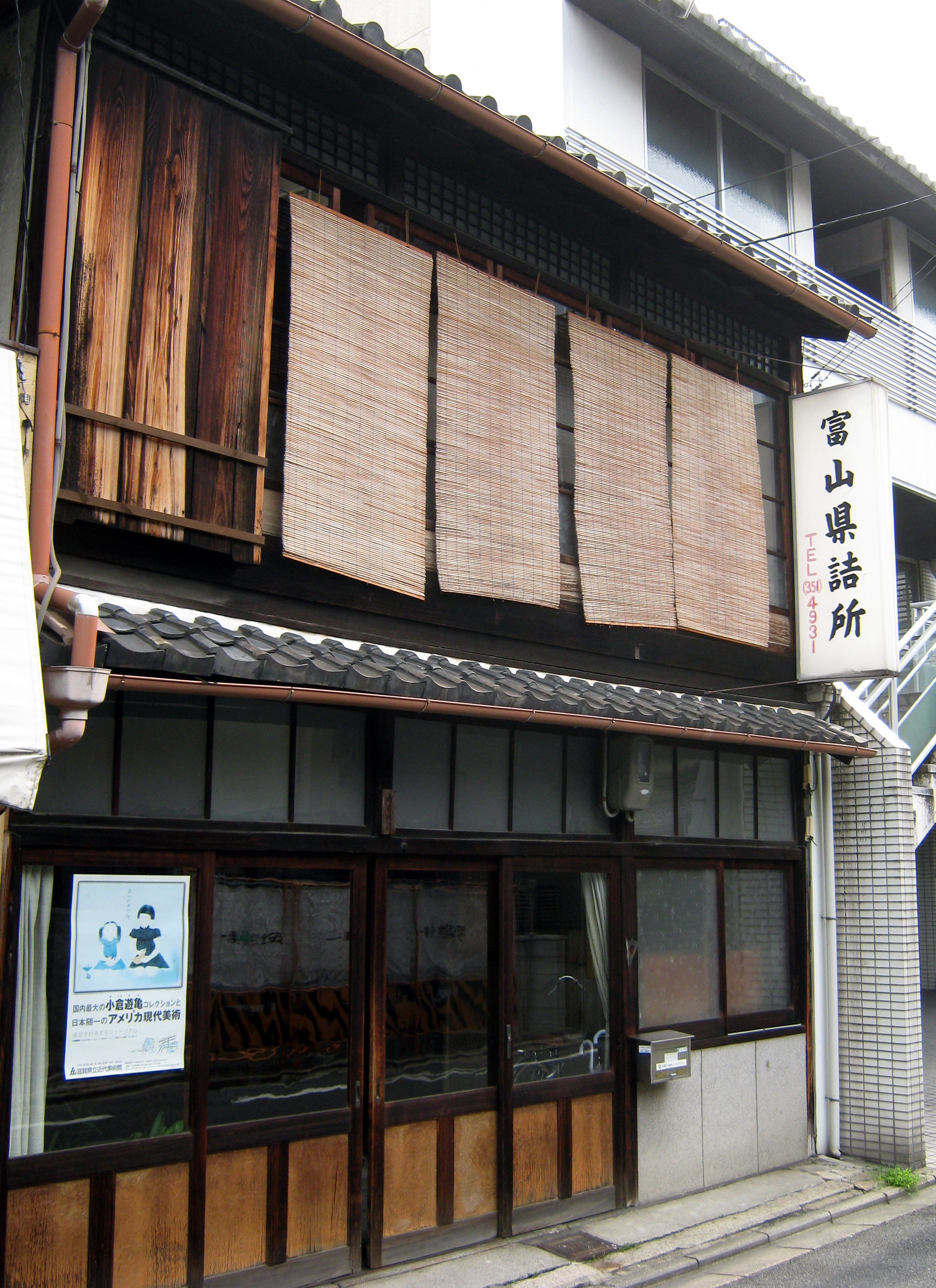 詰所